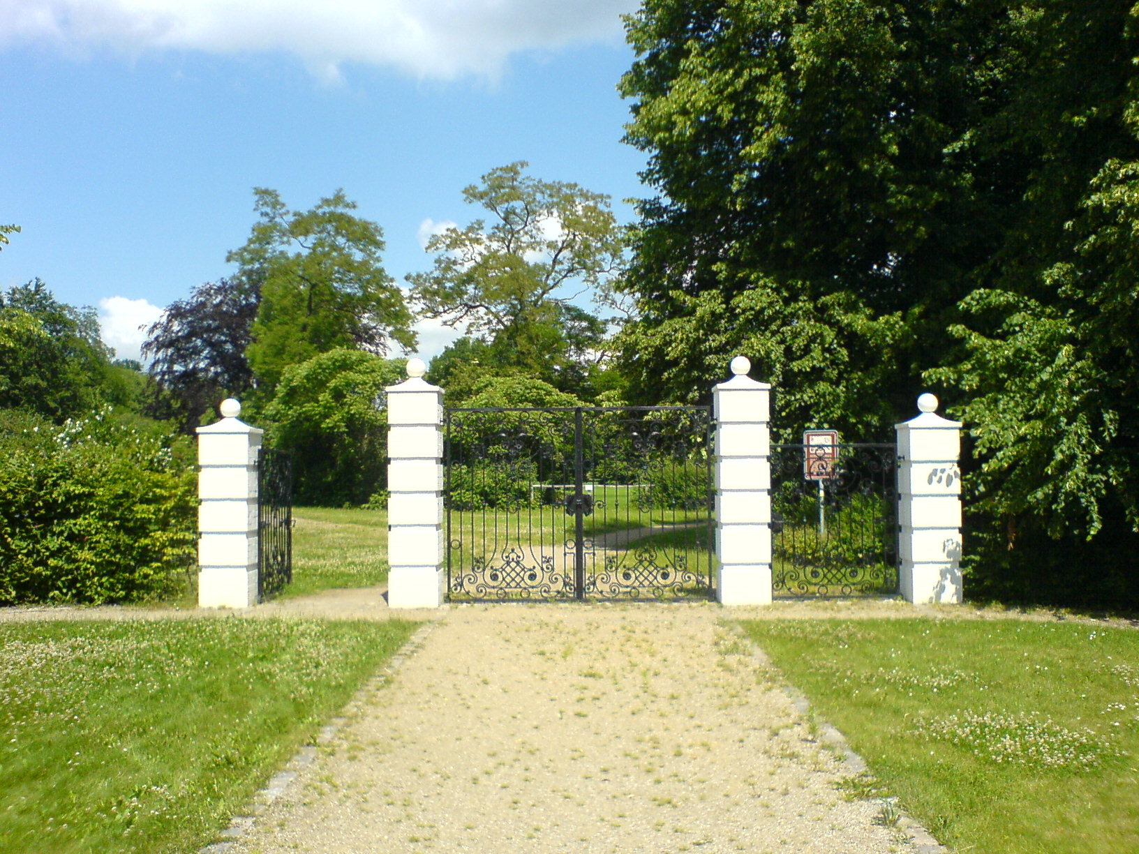 Jersbek Tor